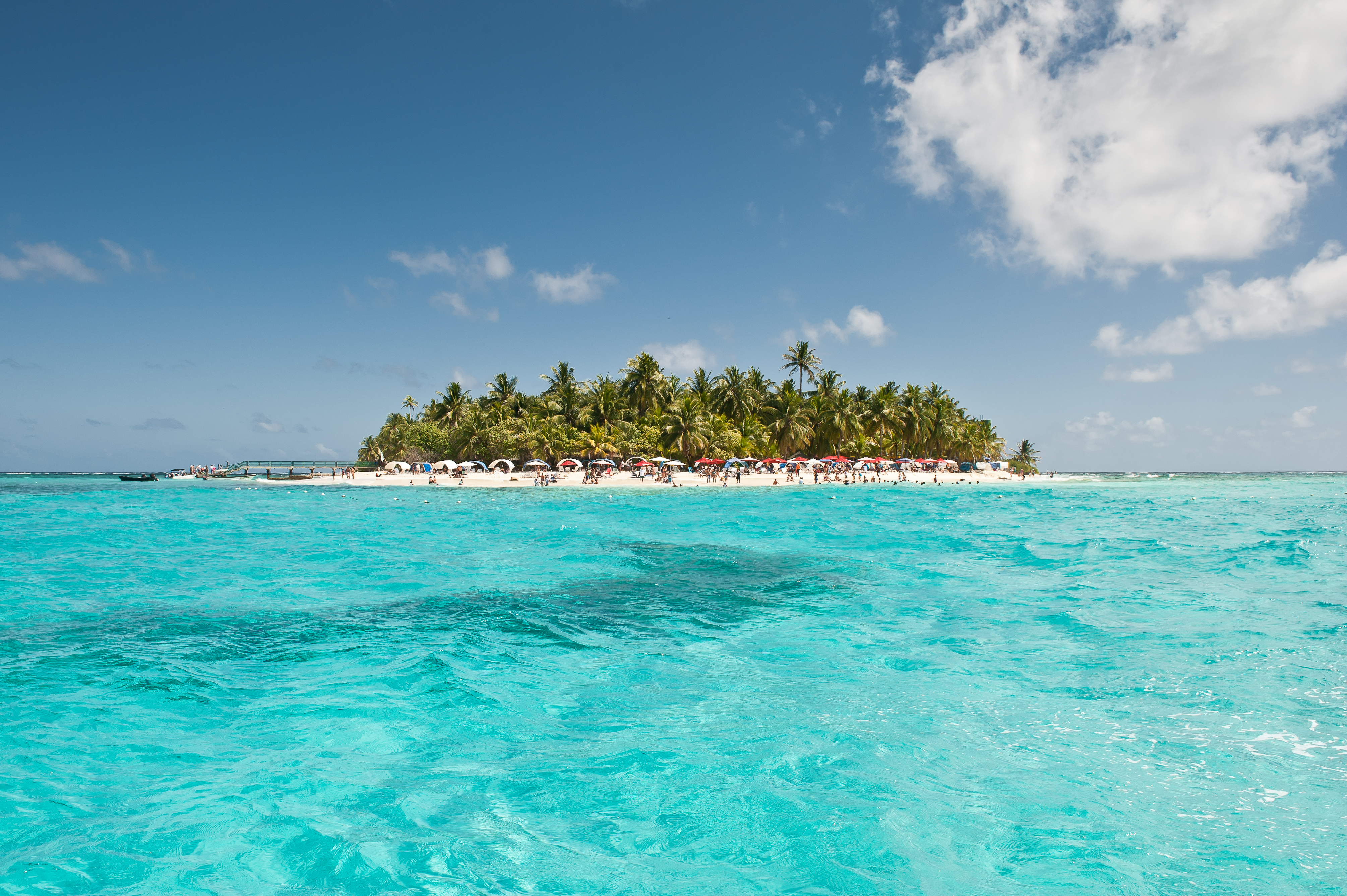 Johny Cay es uno de los más bellos cayos del Archipiélago de San Andrés y Providencia, Colombia.